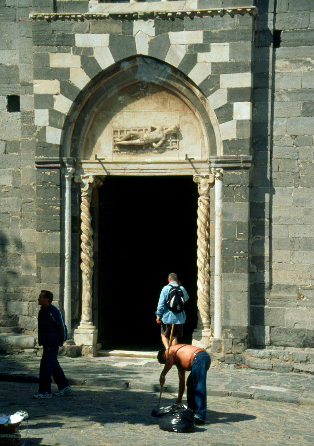 Porto Venere 2004